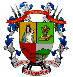 Escudo de Armas del Municipio Naguanagua, estado Carabobo, Venezuela